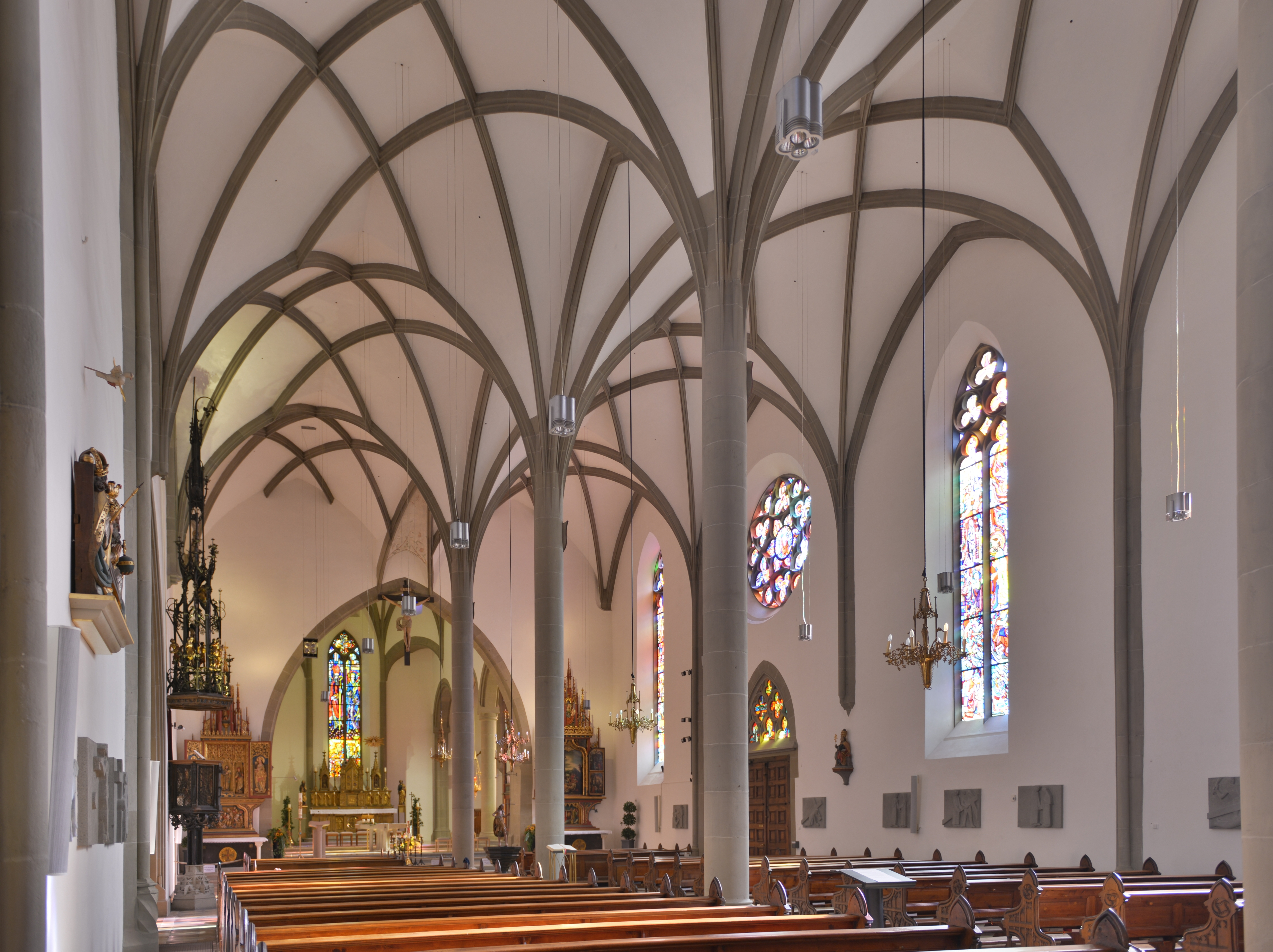 Dom St. Nikolaus (Feldkirch) am Domplatz Nr.2 in Feldkirch.